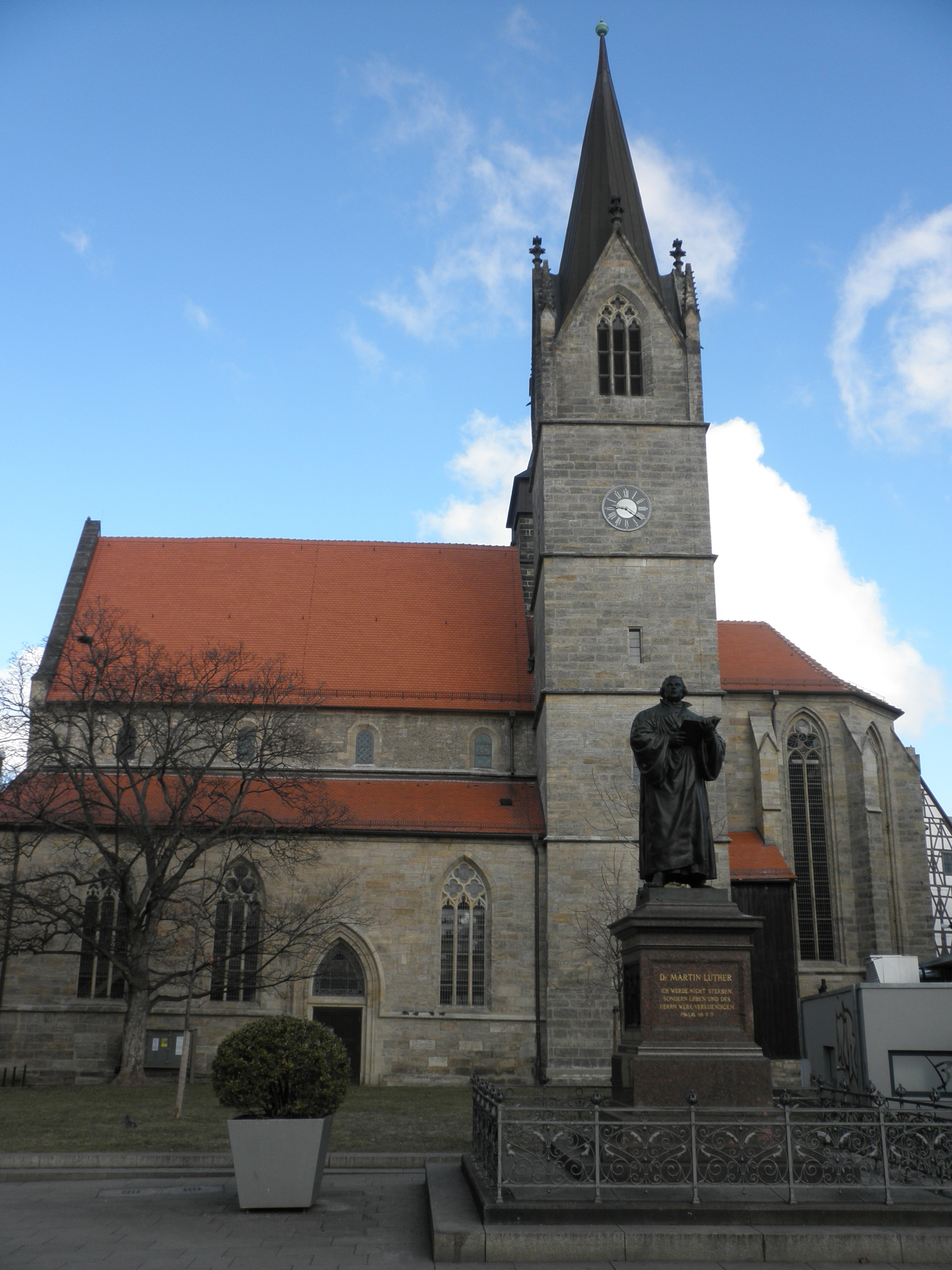 Kaufmannskirche